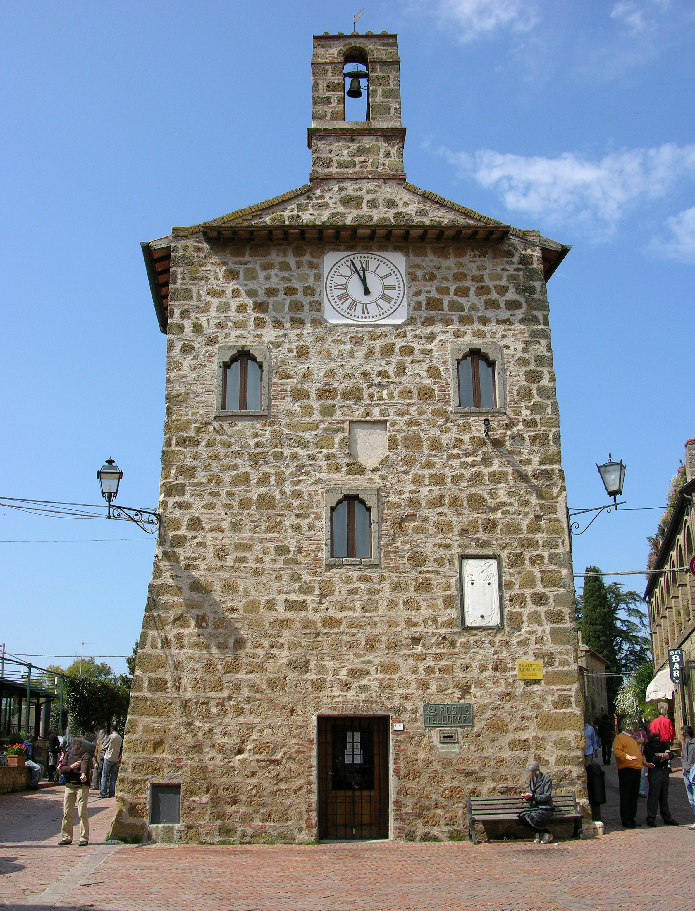 Palazzo Comunale (o dell'Archivio) a Sovana (GR), Italy